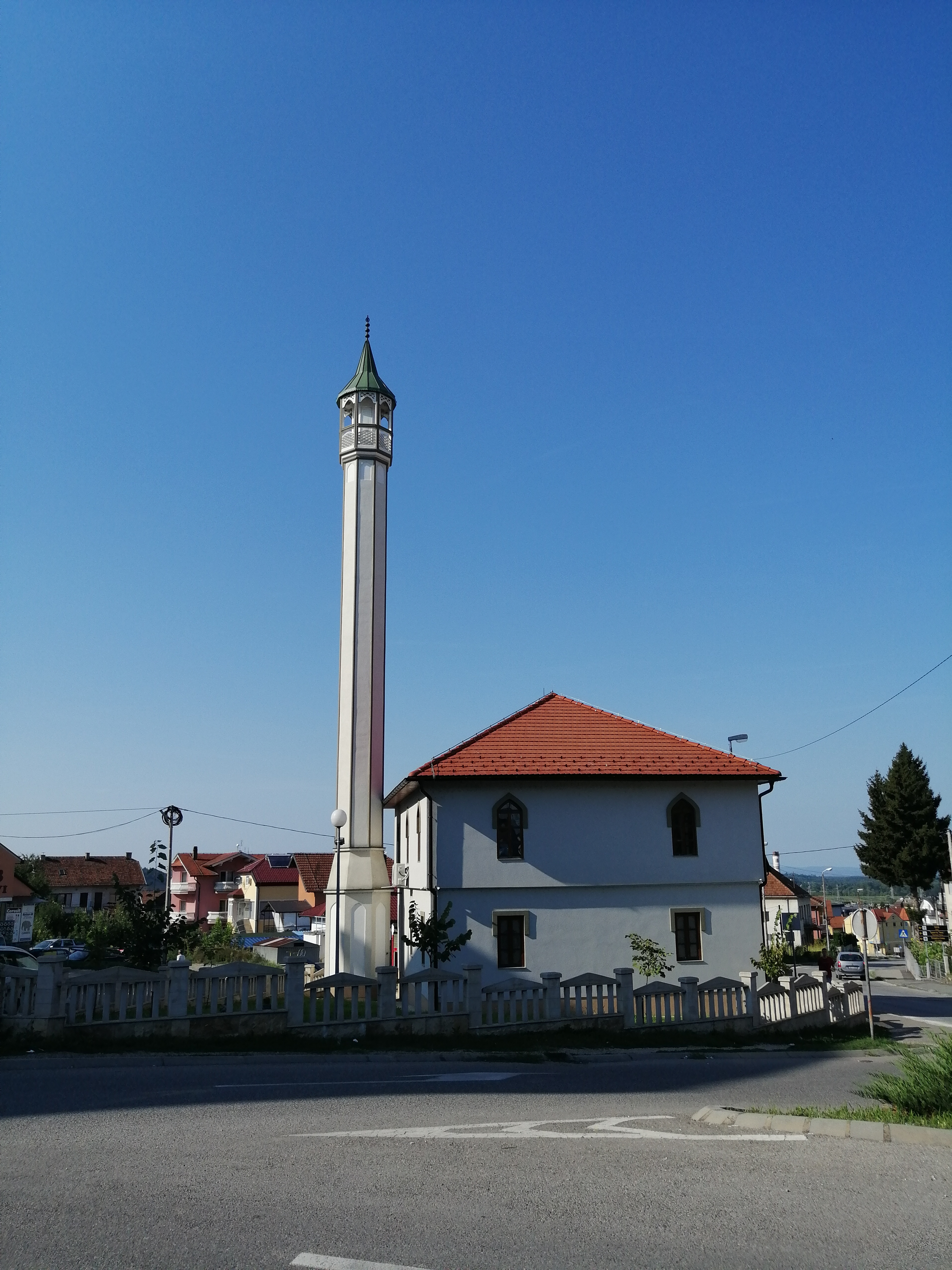 NKD373 Dolnjacka dzamija u Derventi.